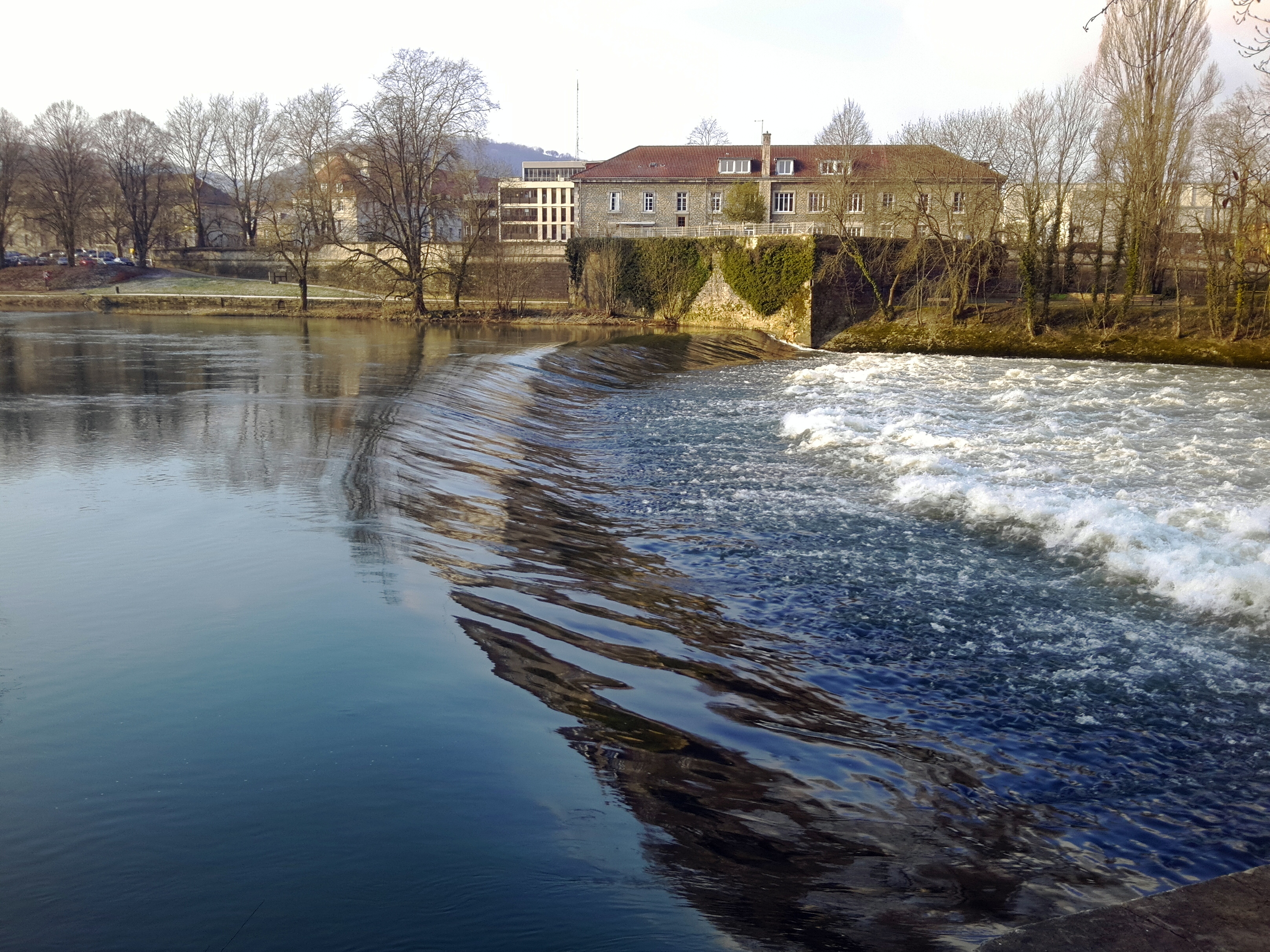 Дубские пороги